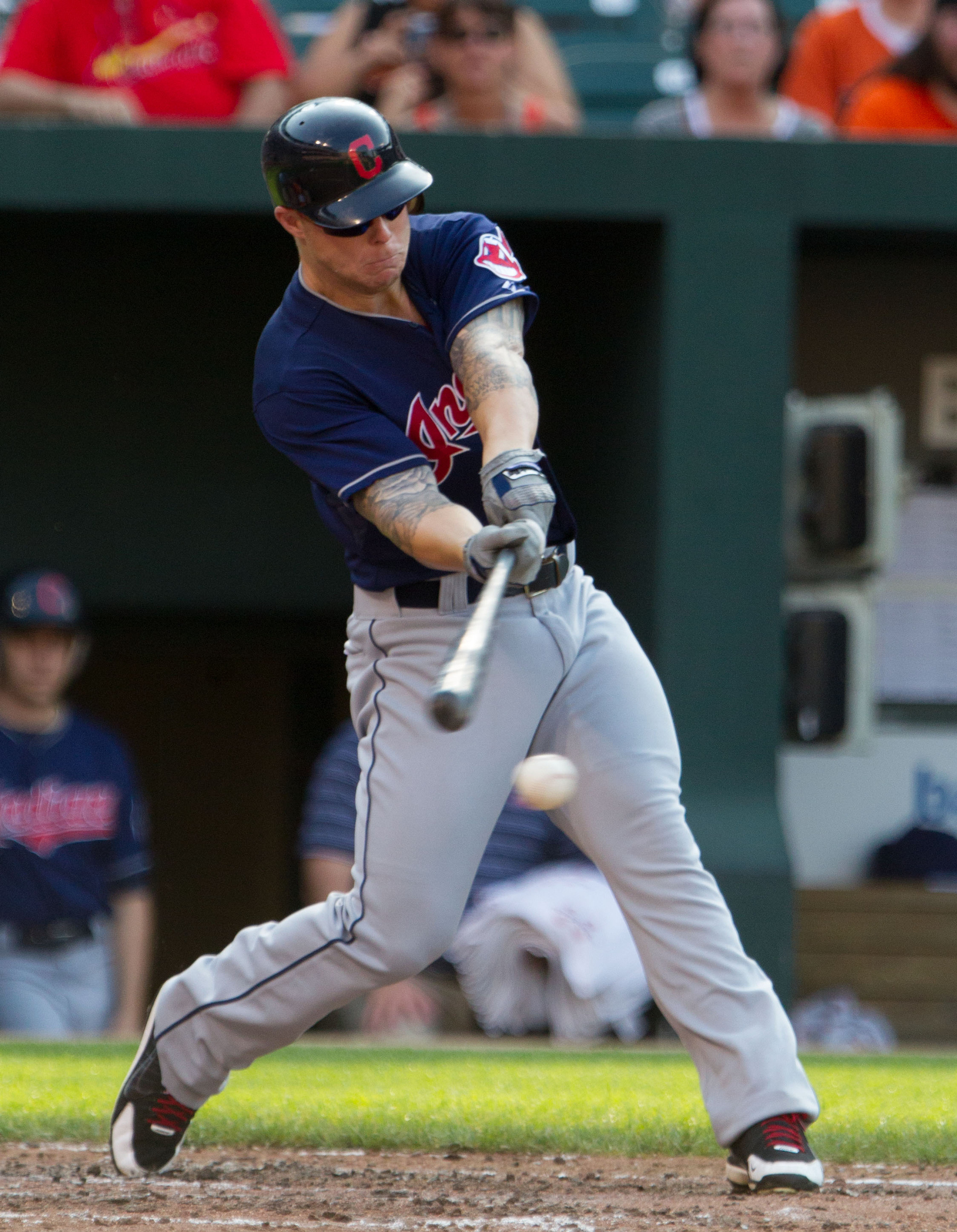 Aaron Cunningham